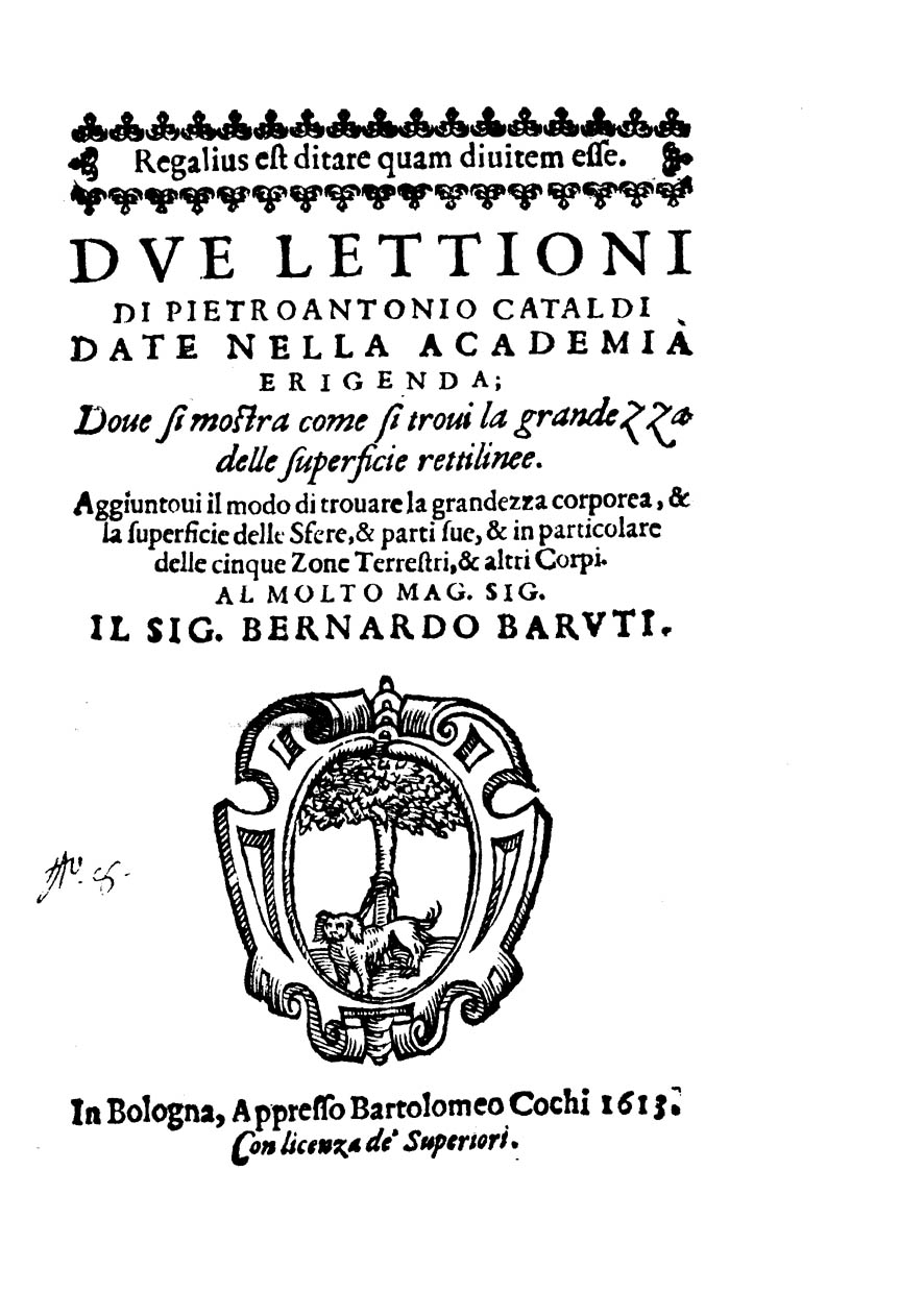 Due lettioni di Pietro Antonio Cataldi date nella academia erigenda doue si mostra come si troui la grandezza delle superficie rettilinee .... - In Bologna : appresso Bartolomeo Cochi, 1613. - 32 p. : ill. ; 4º .